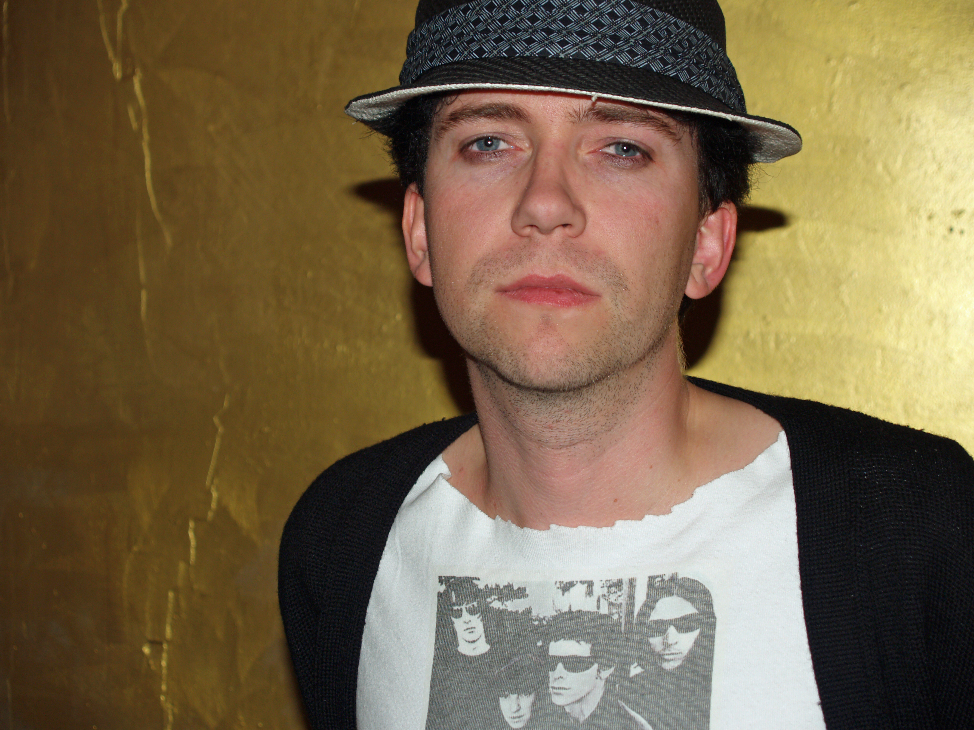 Sune Rose Wagner